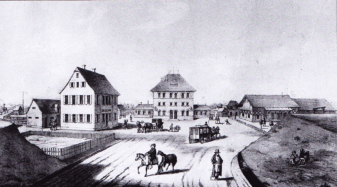 Zeichnung des Bahnhofsvorplatzes von Günzburg um 1860, in der Mitte das Empfangsgebäude